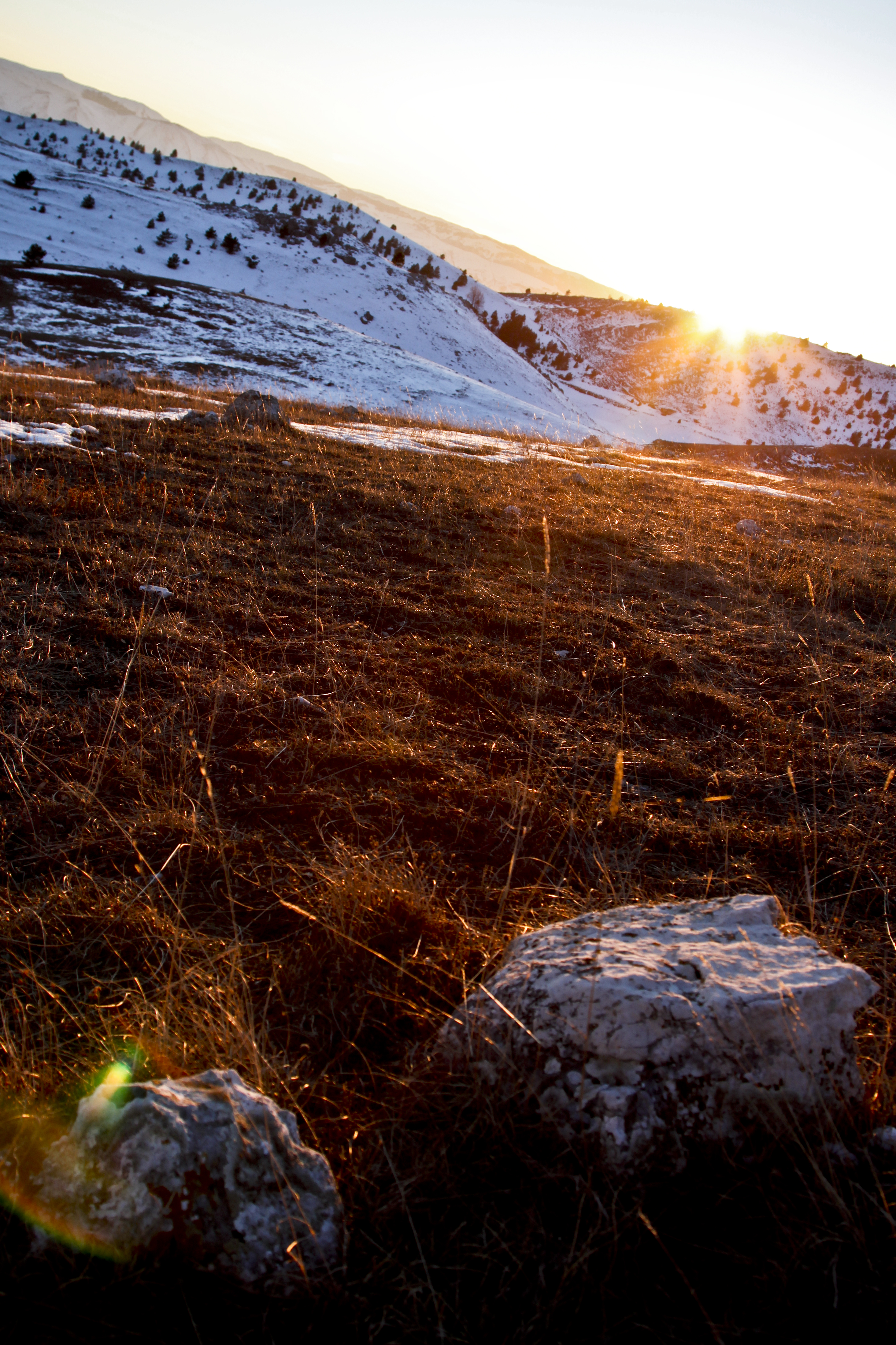 Fotografia di Gabriele Altimari